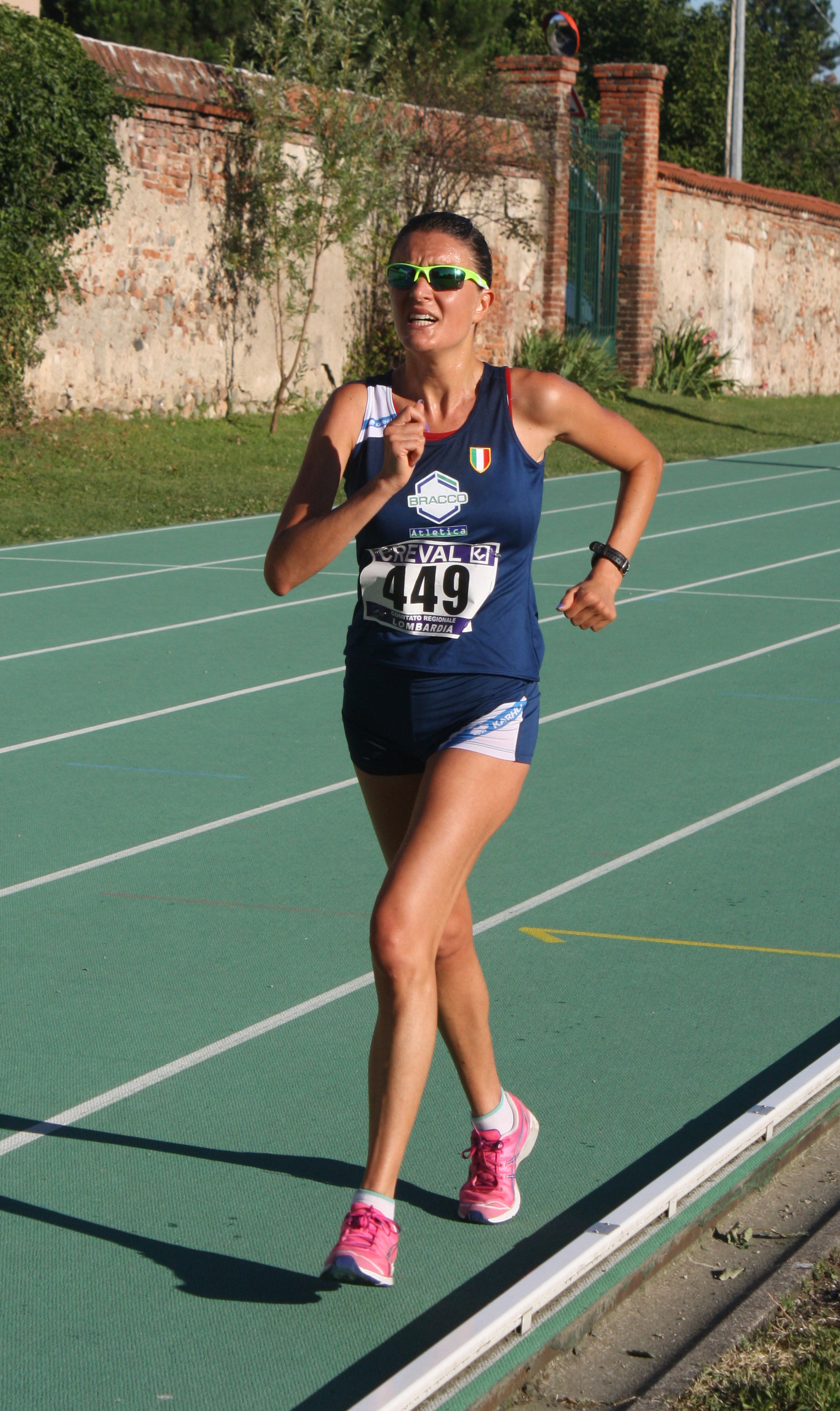 L'atleta italiana Valentina Trapletti il 16 luglio 2016, durante un meeting regionale a Olgiate Olona.